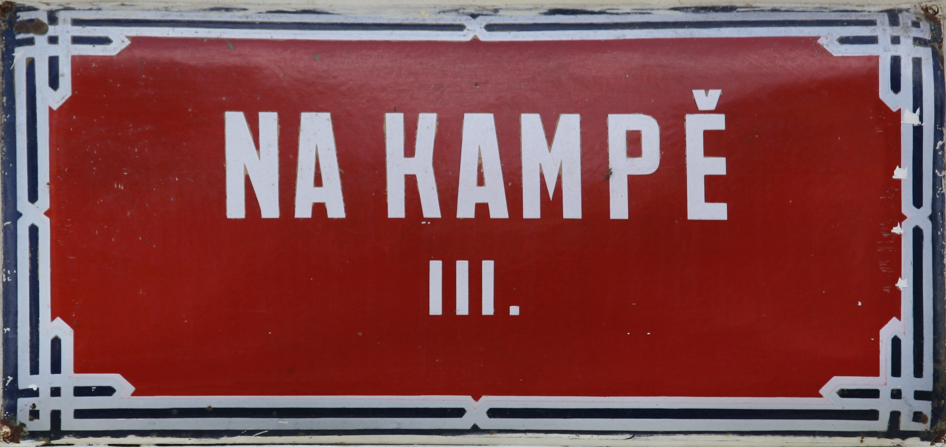 Uliční cedule